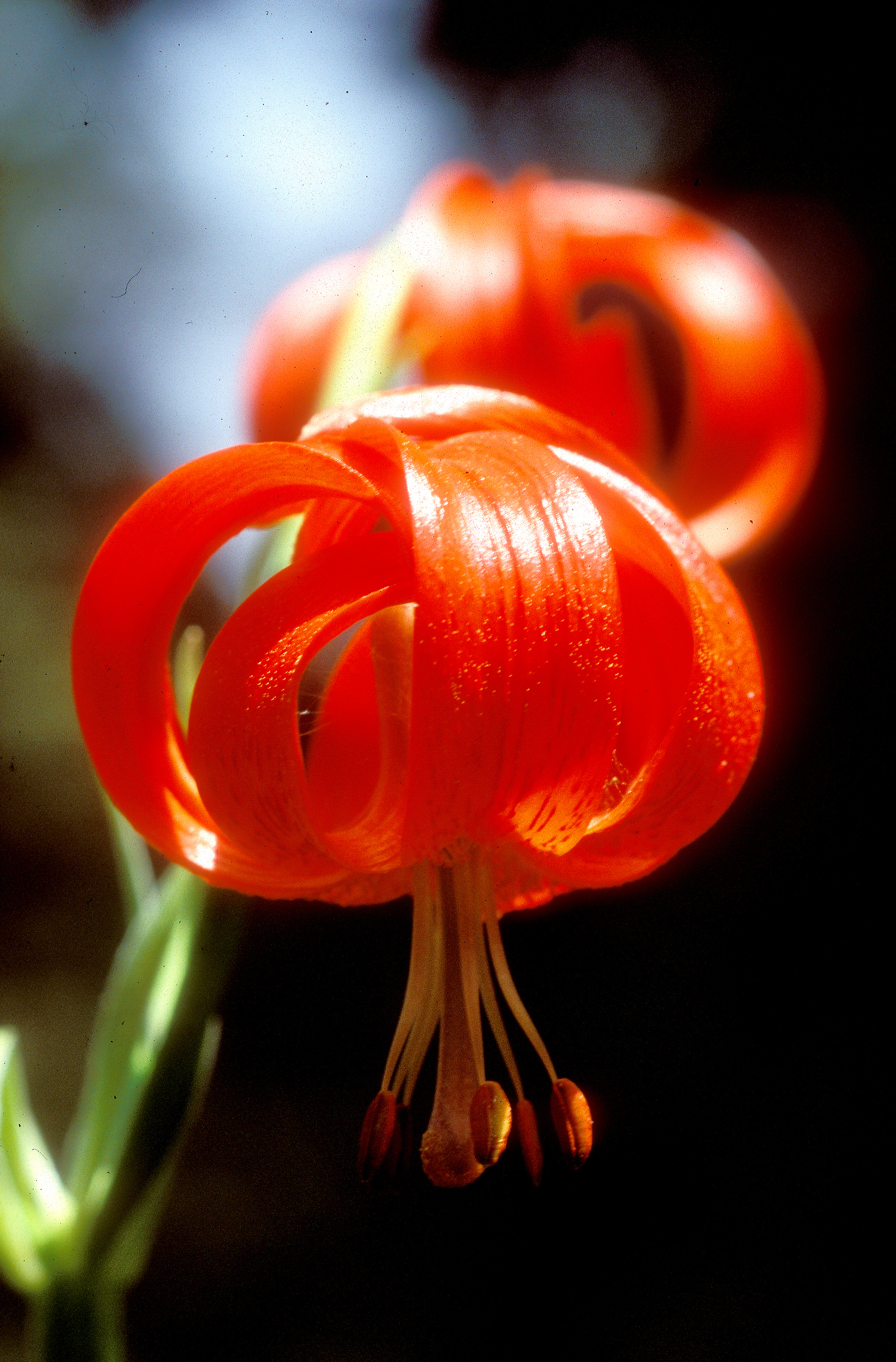 Lilium chalcedonicum in habitat at Hrisomiglia, Greece